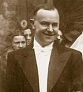 Karel Bockaert - burgemeester Aalter van 1932 tot 1941 - in 1938 - Aalter - Oost-Vlaanderen - België